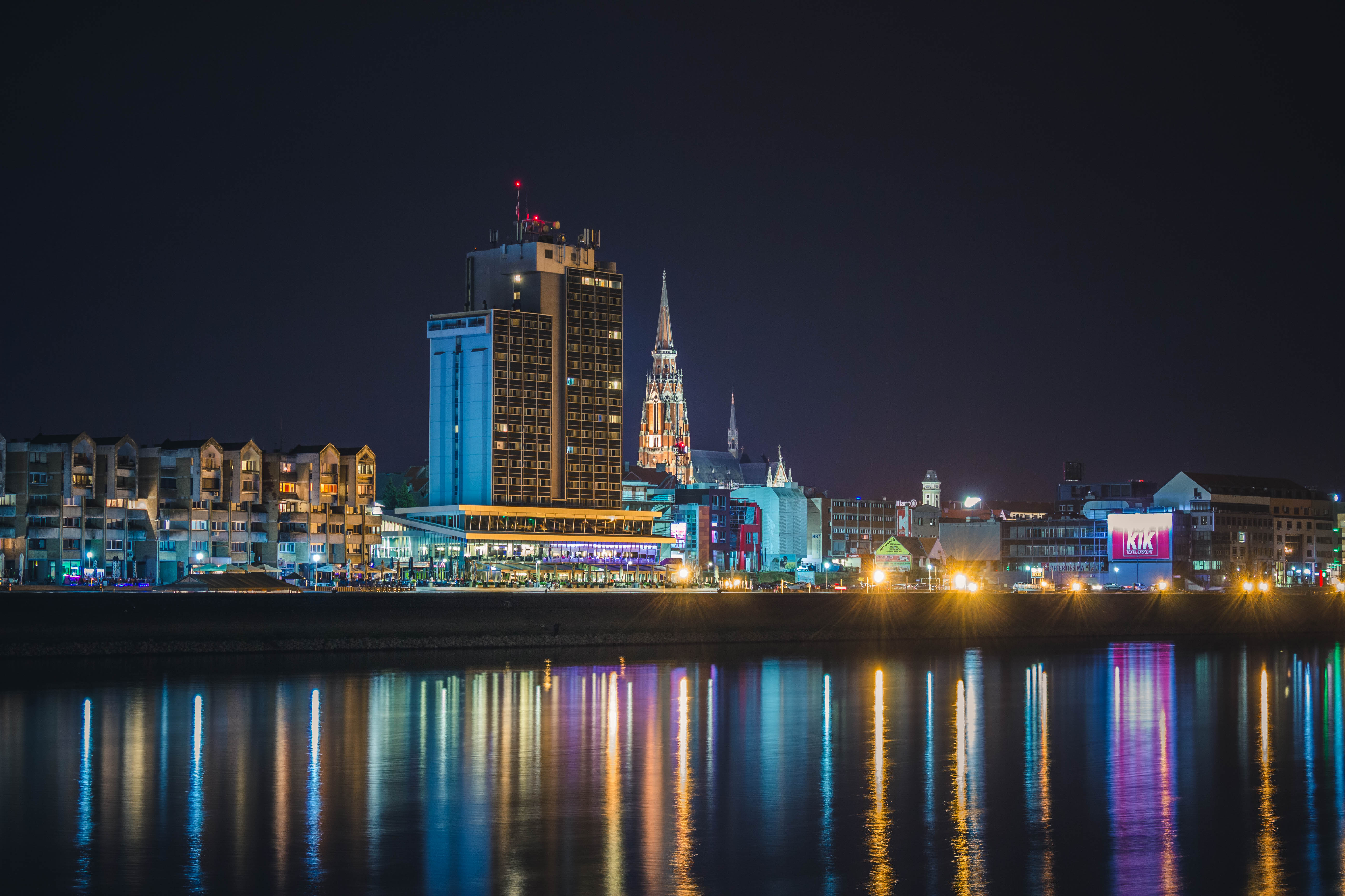 Osijek panorama - Gornji grad po noći